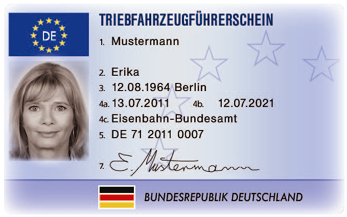 Gemeinschaftsmodell für den Triebfahrzeugführerschein (Vorderseite des Tfz-Führerscheins nach dem europaweit einheitlichen Muster, deutsche Version entsprechend TfV)